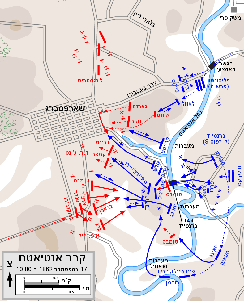 Antietam Battle